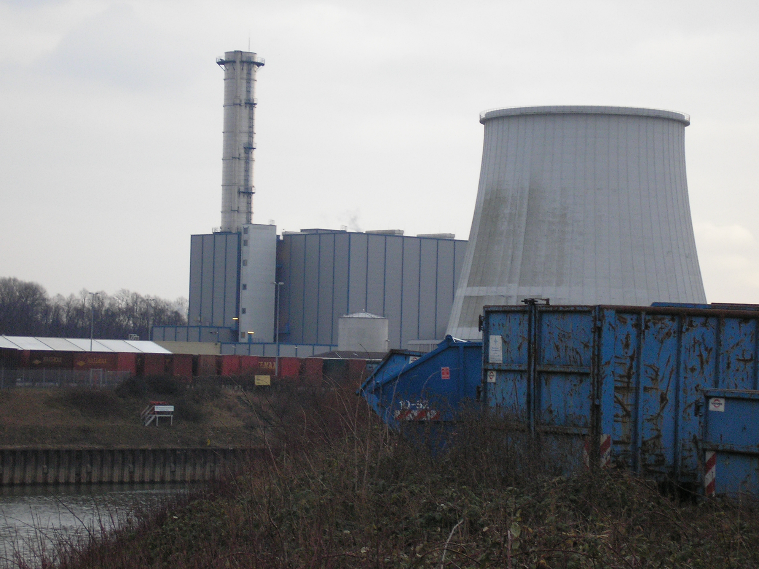 Heizkraftwerk Niehl im Kölner Hafen Niehl I